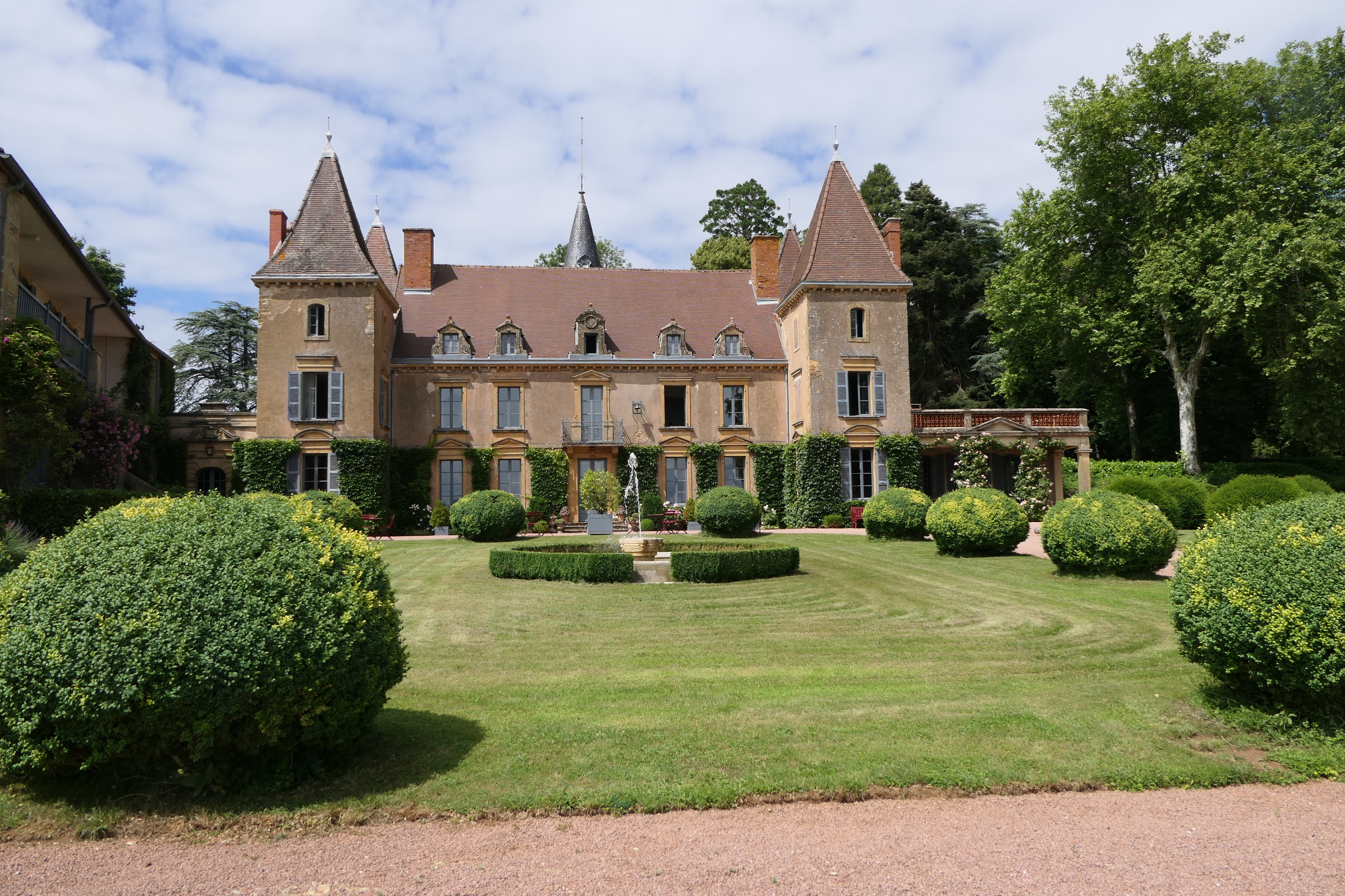 Saint-Julien-de-Civry nouveau château de Vaulx